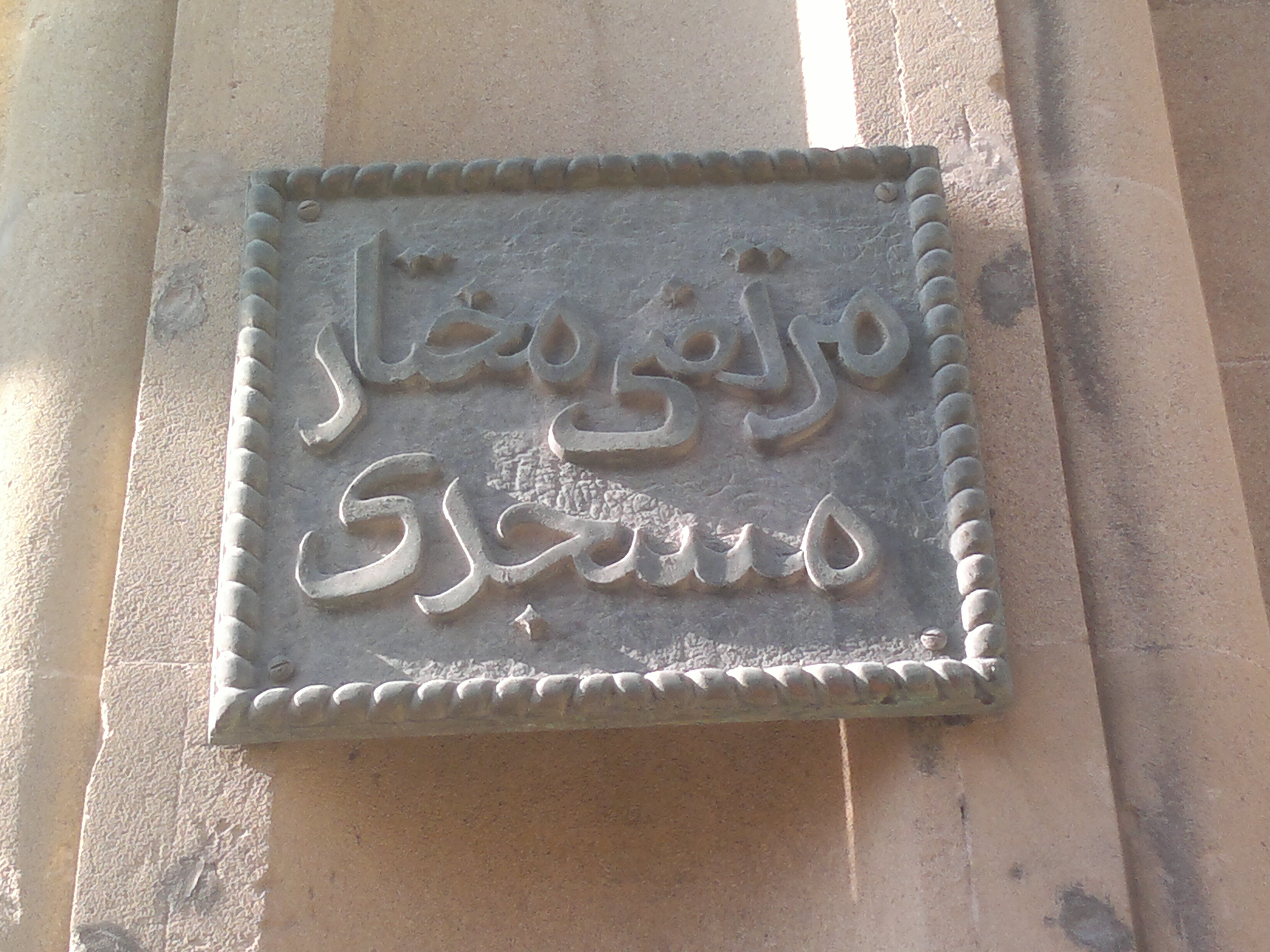 Murtuza Muxtarov məscidi